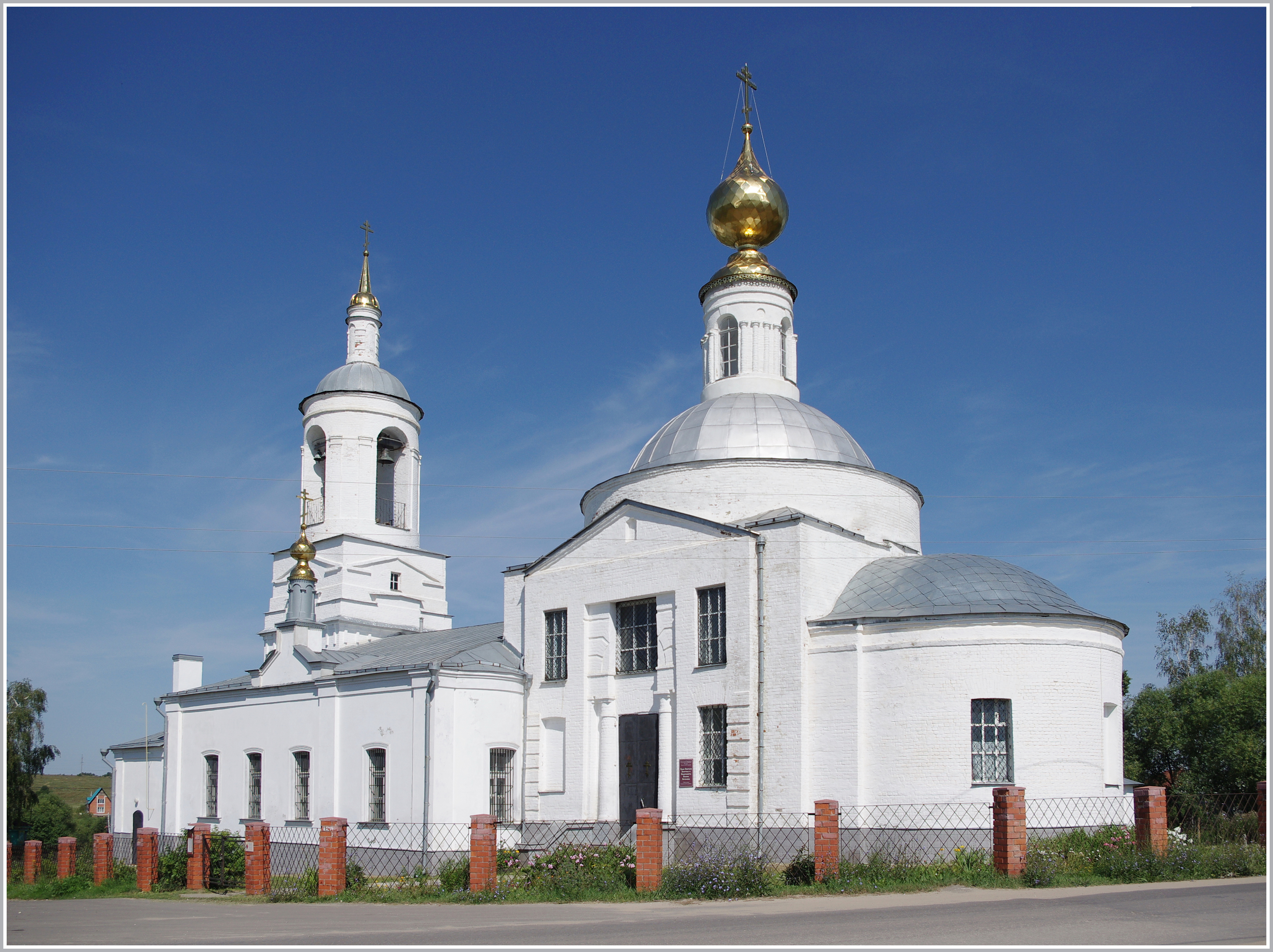 Владимирская область. с.Богослово. Храм Святого Апостола и евангелиста Иоанна Богослова.